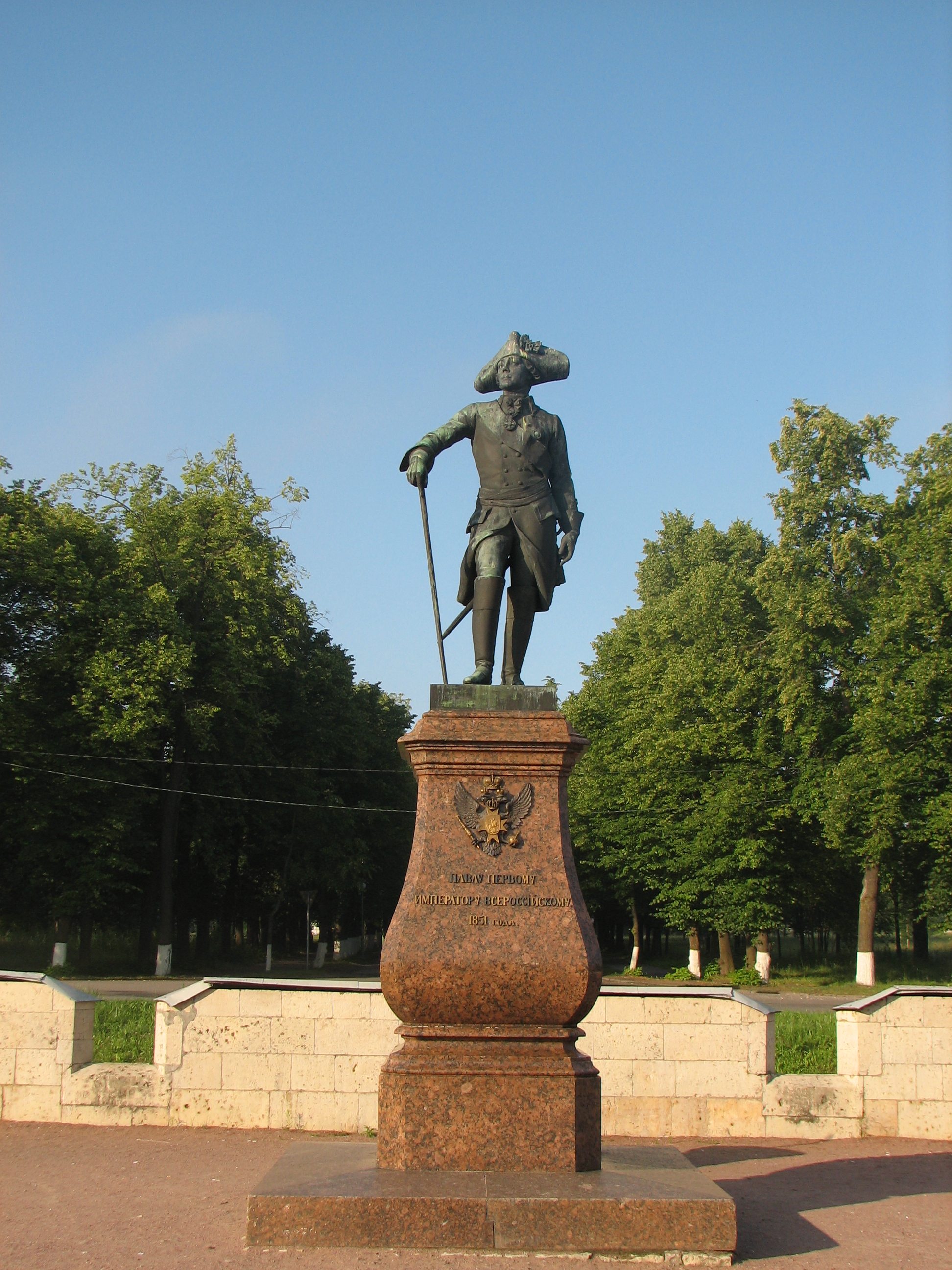 Памятник Павлу I в Гатчине